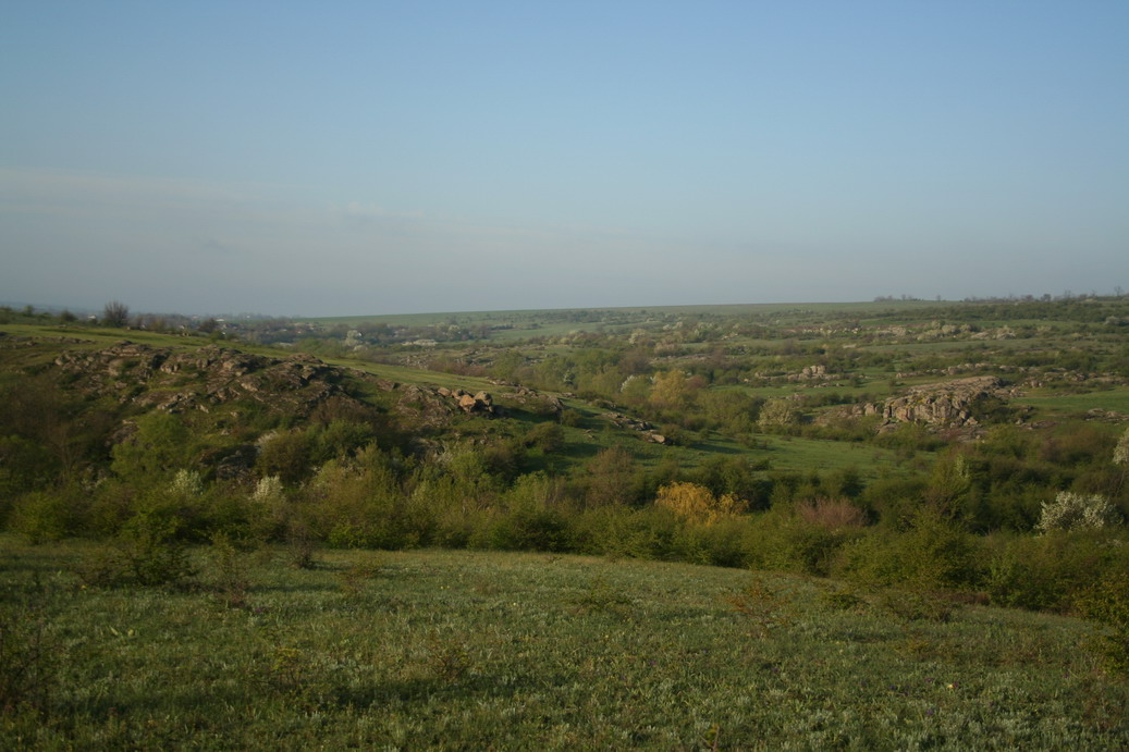 Mertvovod valley